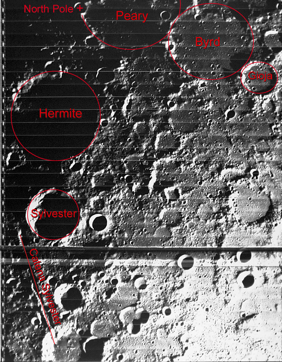 西尔维斯特环形山周边图